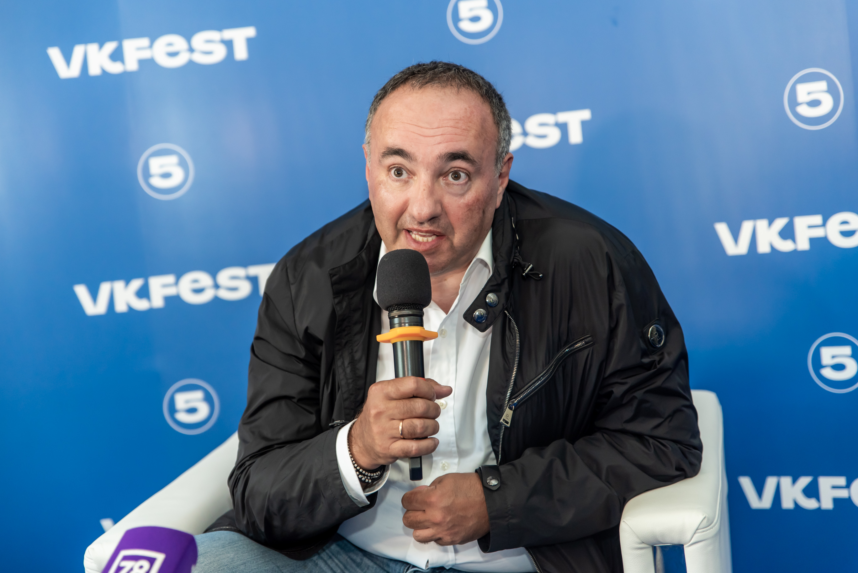 Александр Роднянский на VK Fest 5